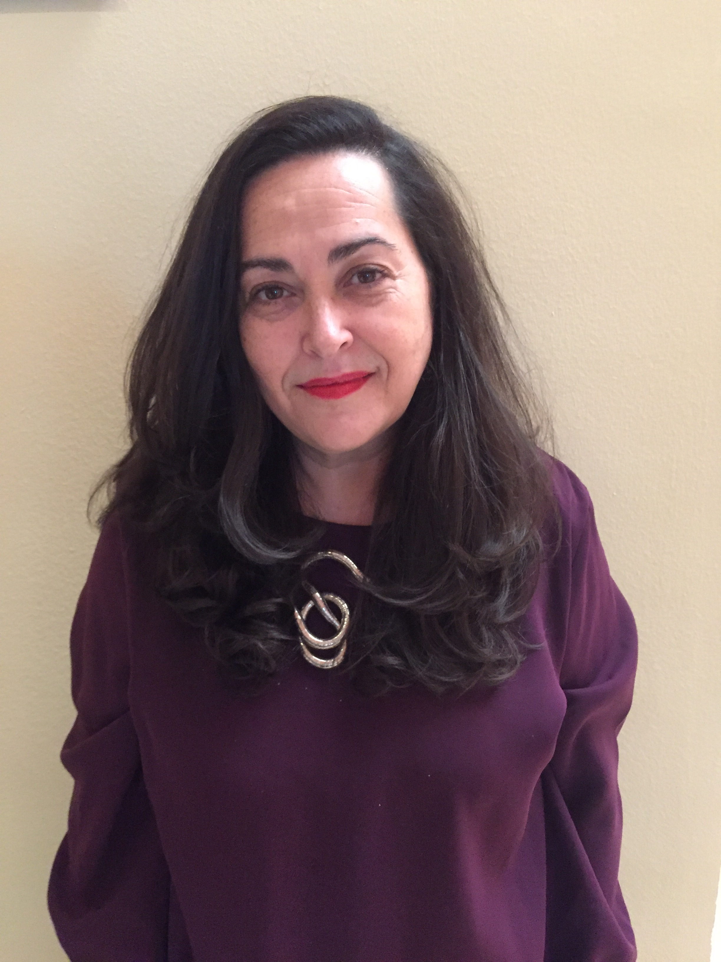 En inauguración Museo Thyssen de Madrid